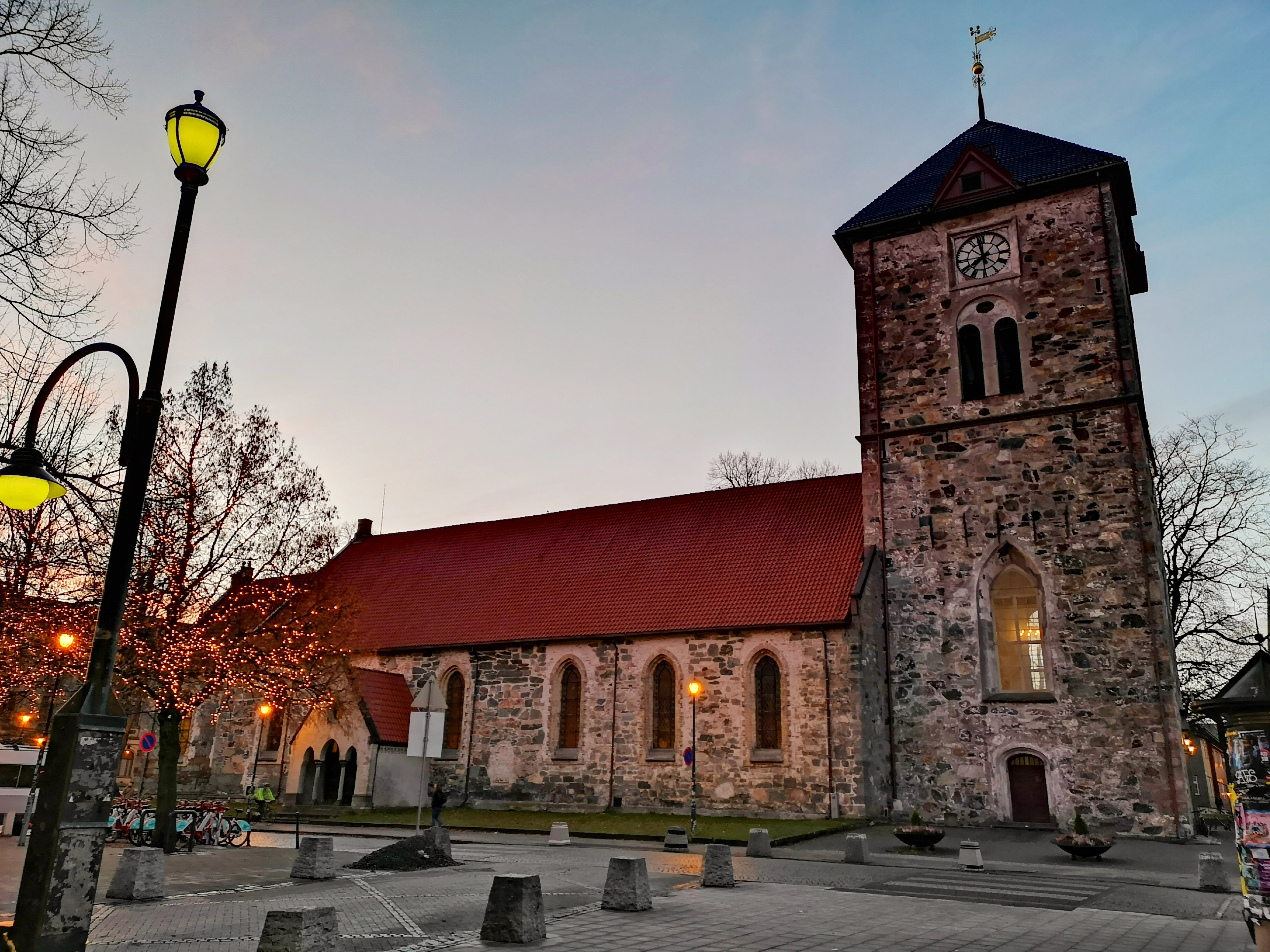 Vår Frue kirke i Trondheim sentrum